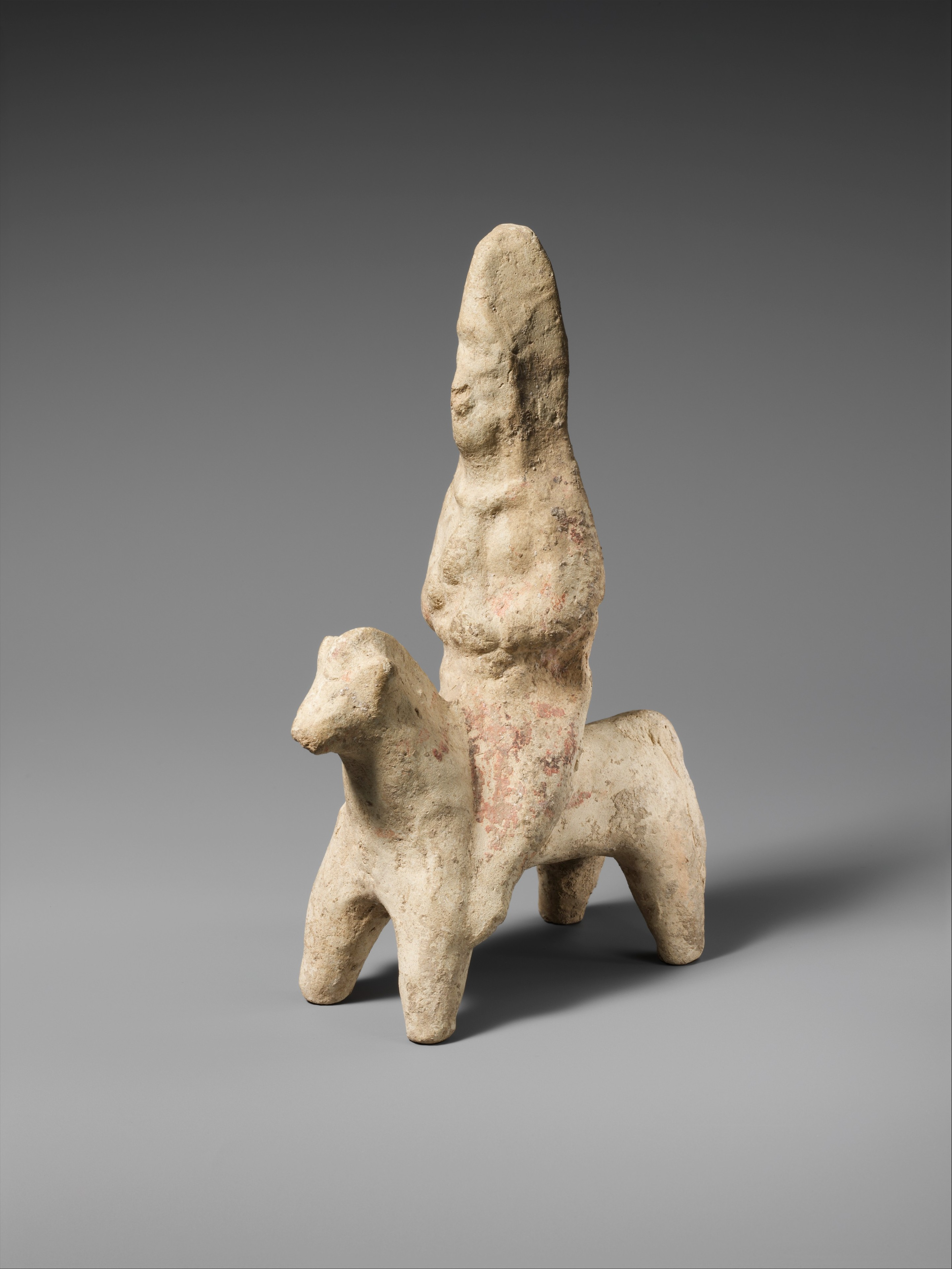 Parthian; Sculpture; Ceramics-Sculpture